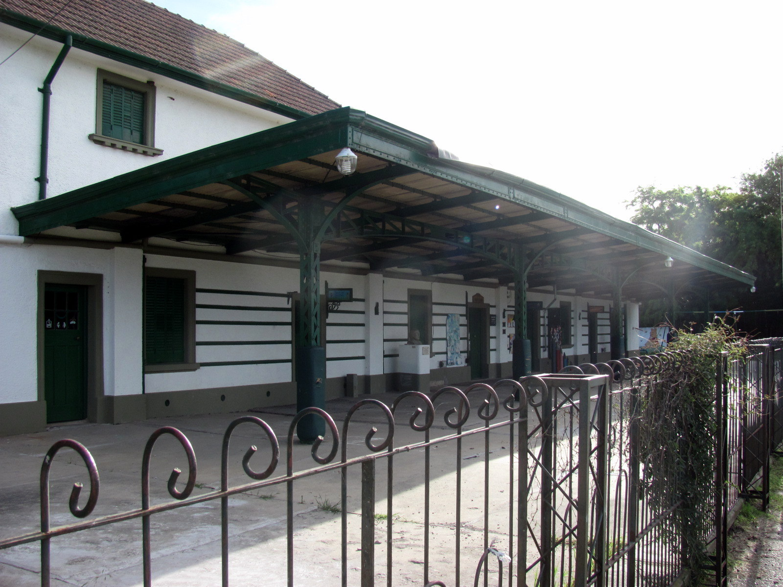 San Francisco De Bellocq, Provincia de Buenos Aires, Argentina.